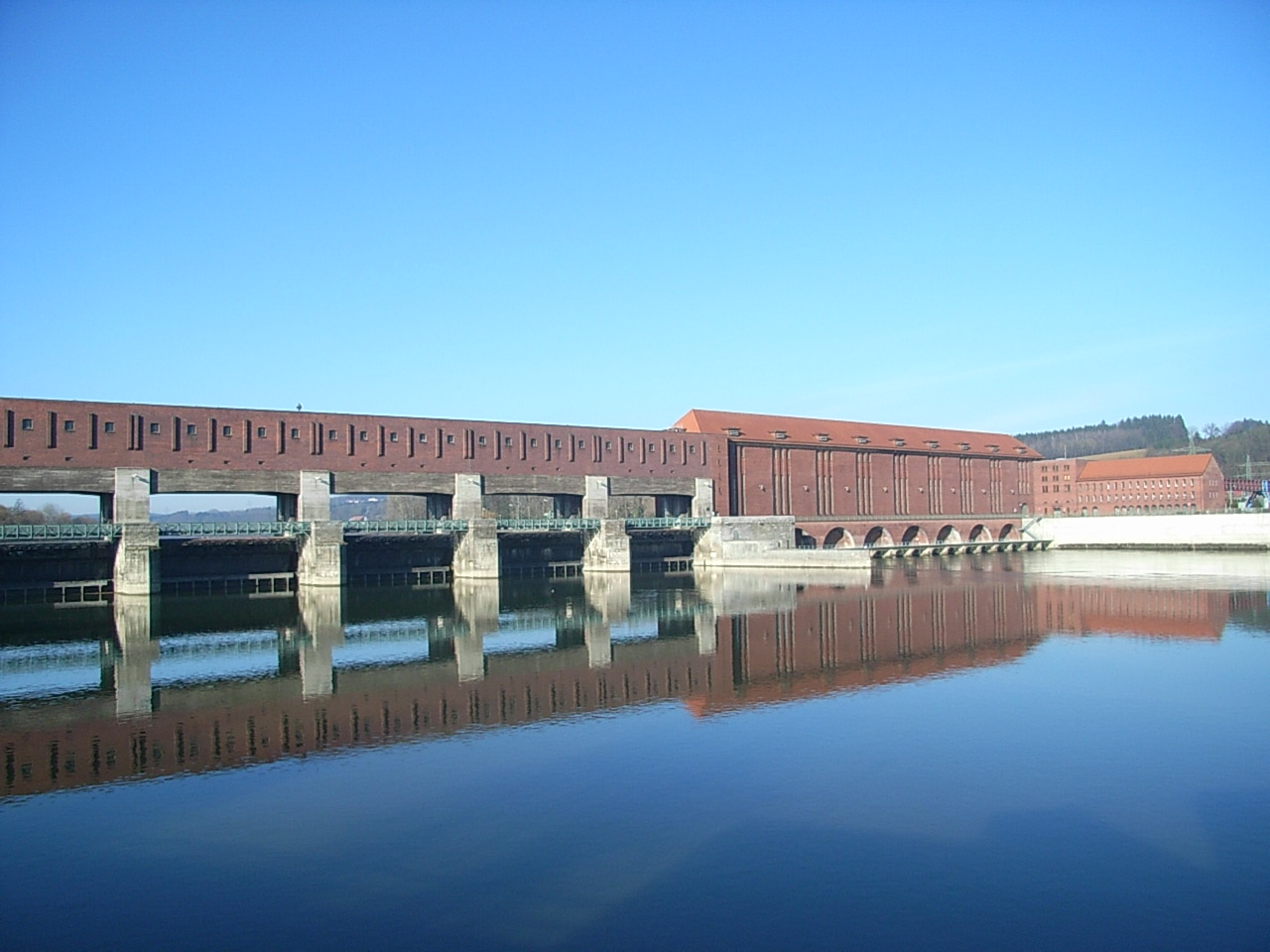 Kraftwerk Kachlet 2007